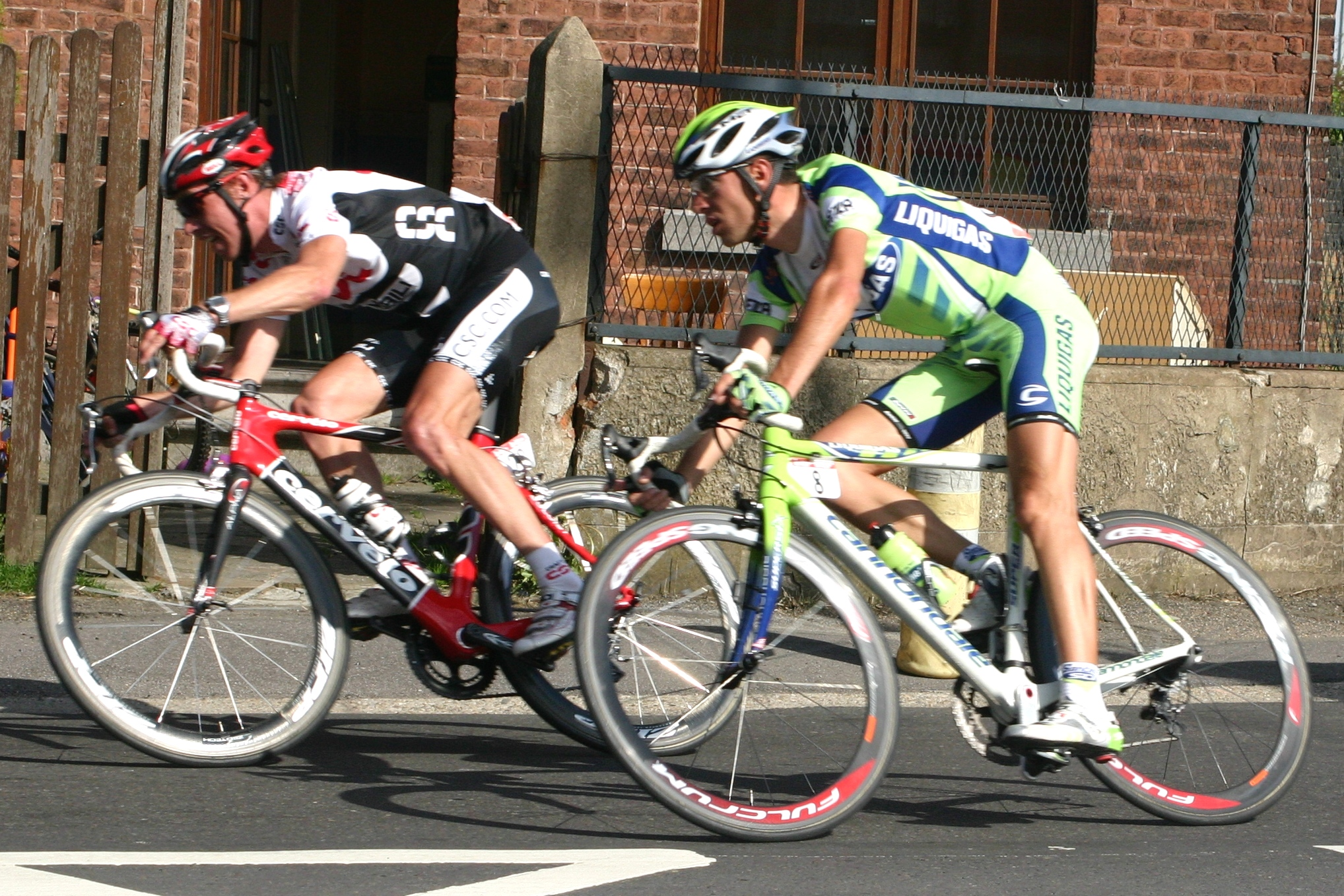 De Vincenzo Nibali (Equipe Liquigas) am Liège-Bastogne-Liège 2008 zu Boncelles. Kategorie:Vëlossportler